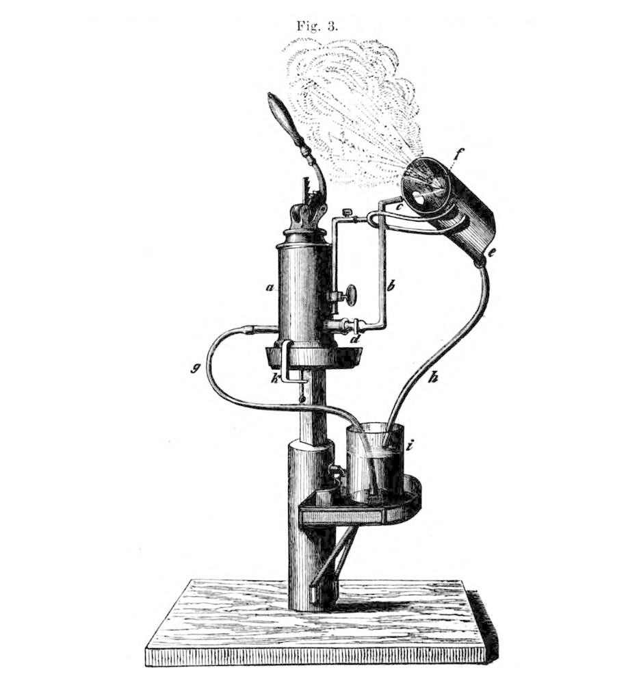 Abbildung: Inhalationsapparat nach Waldenburg